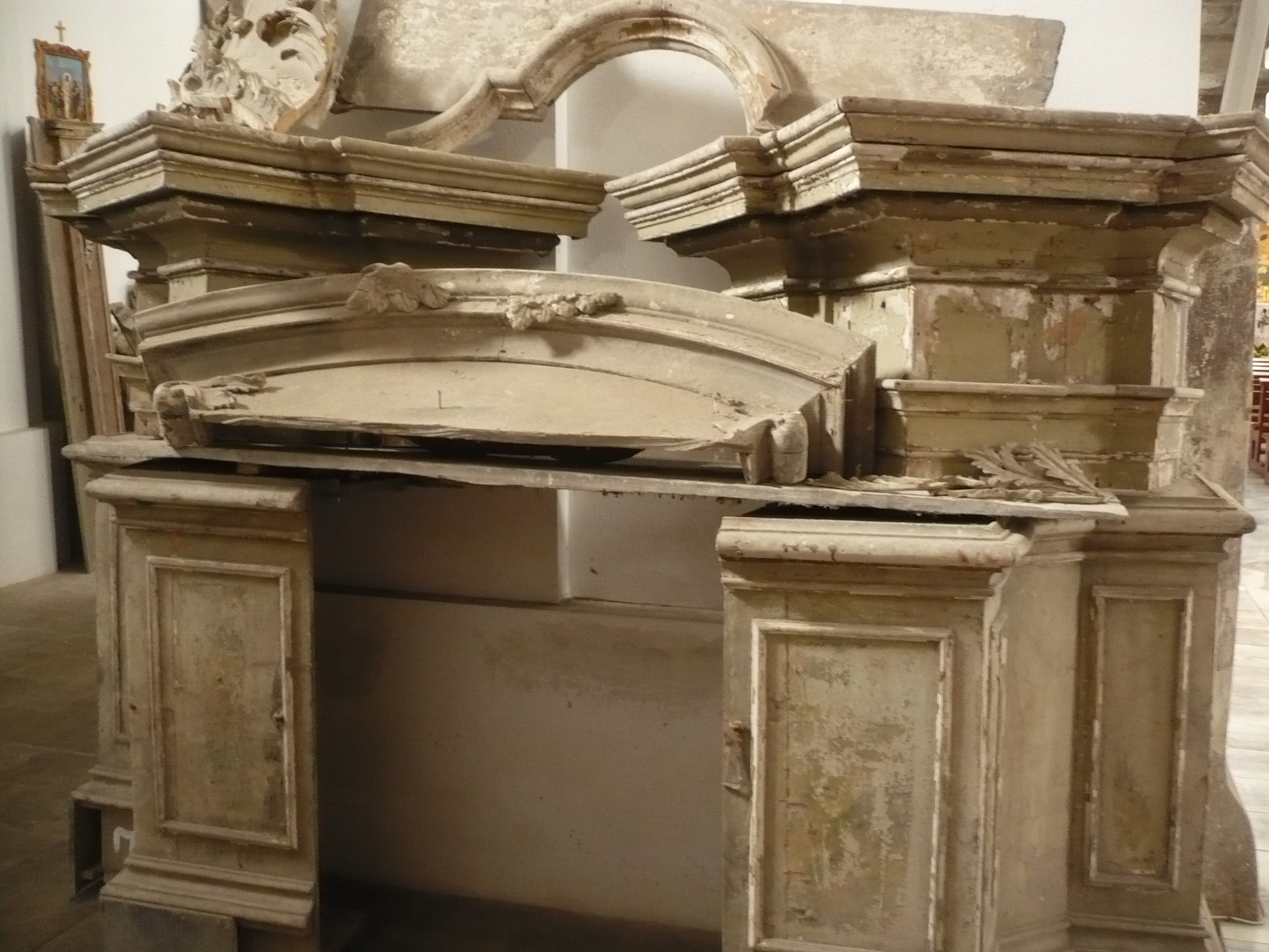 Zbaraż, kościół oo. bernardynów